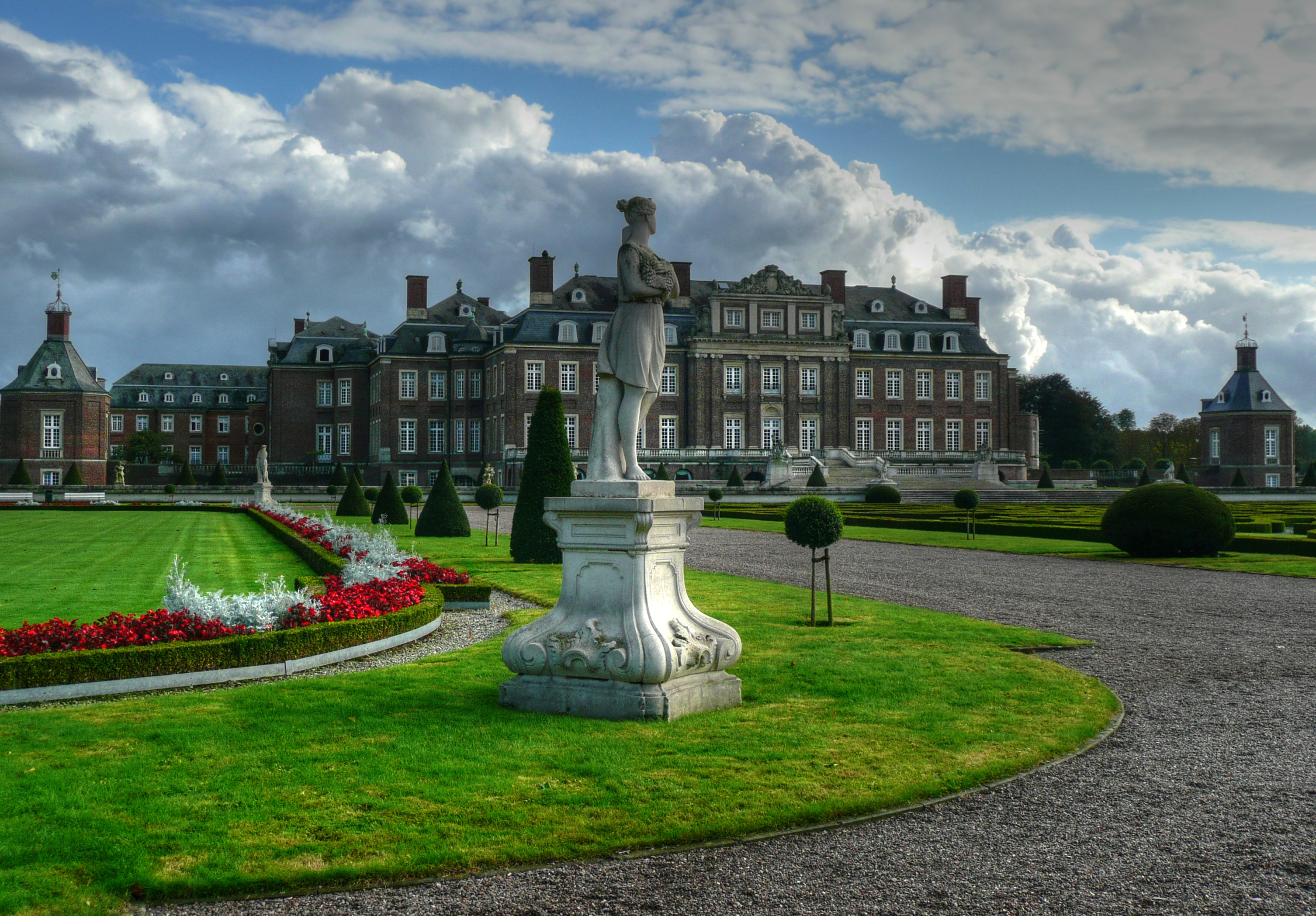 Schloss Nordkirchen, von der Gartenseite aus gesehen; HDR-Foto aus drei digitalen Fotografien